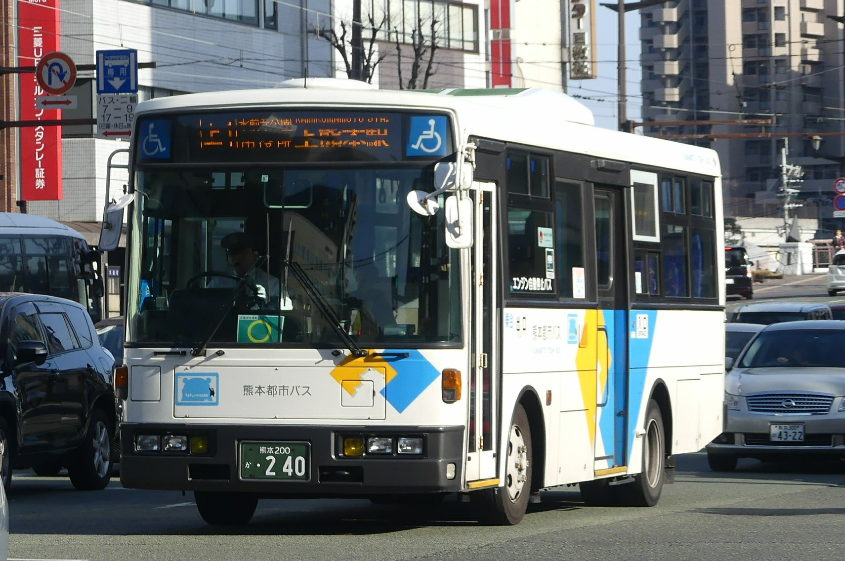 熊本都市バス(新塗装)